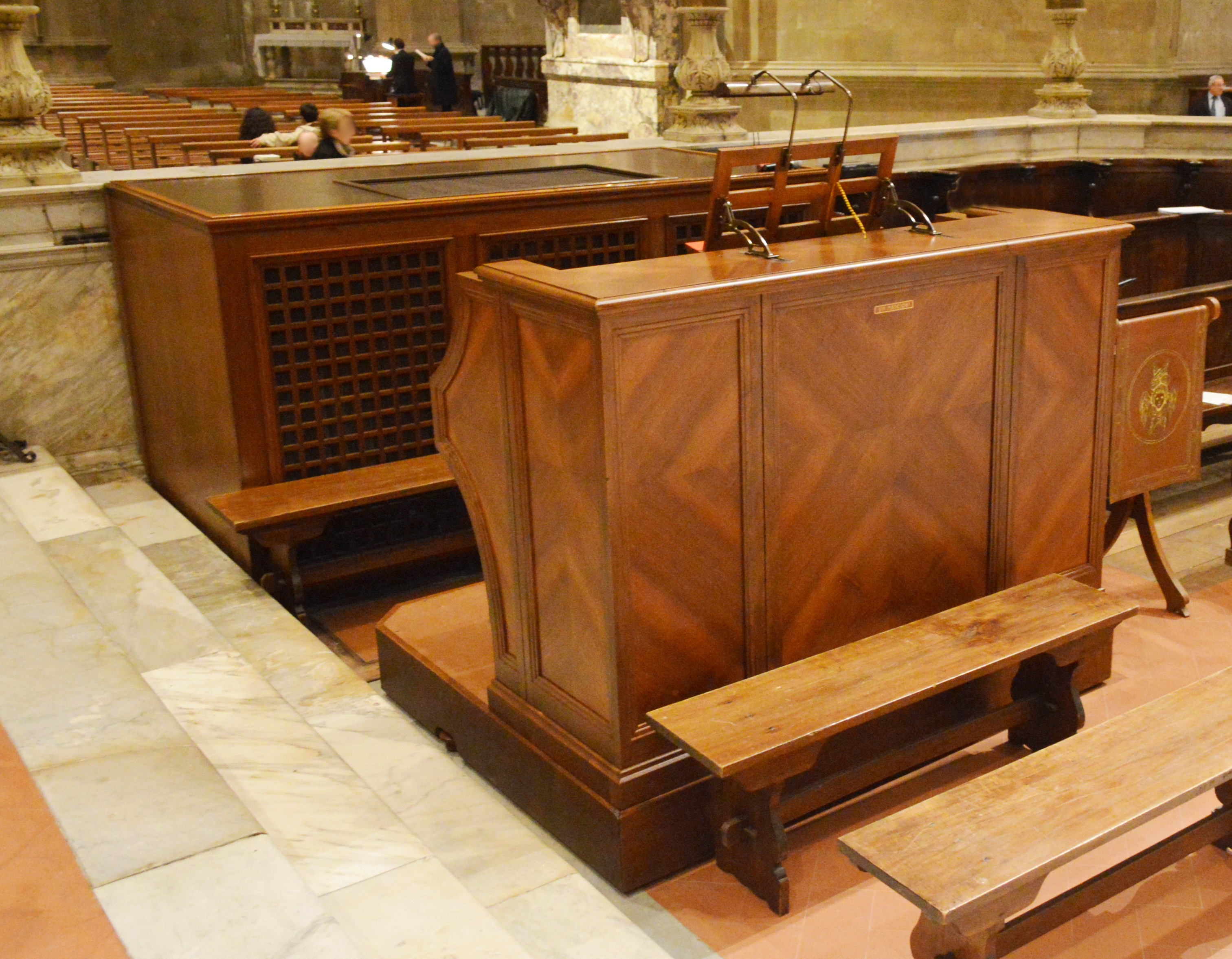 Il corpo corale e la consolle a quattro manuali dell'organo a canne, situati all'interno del recinto del coro, sul lato destro.